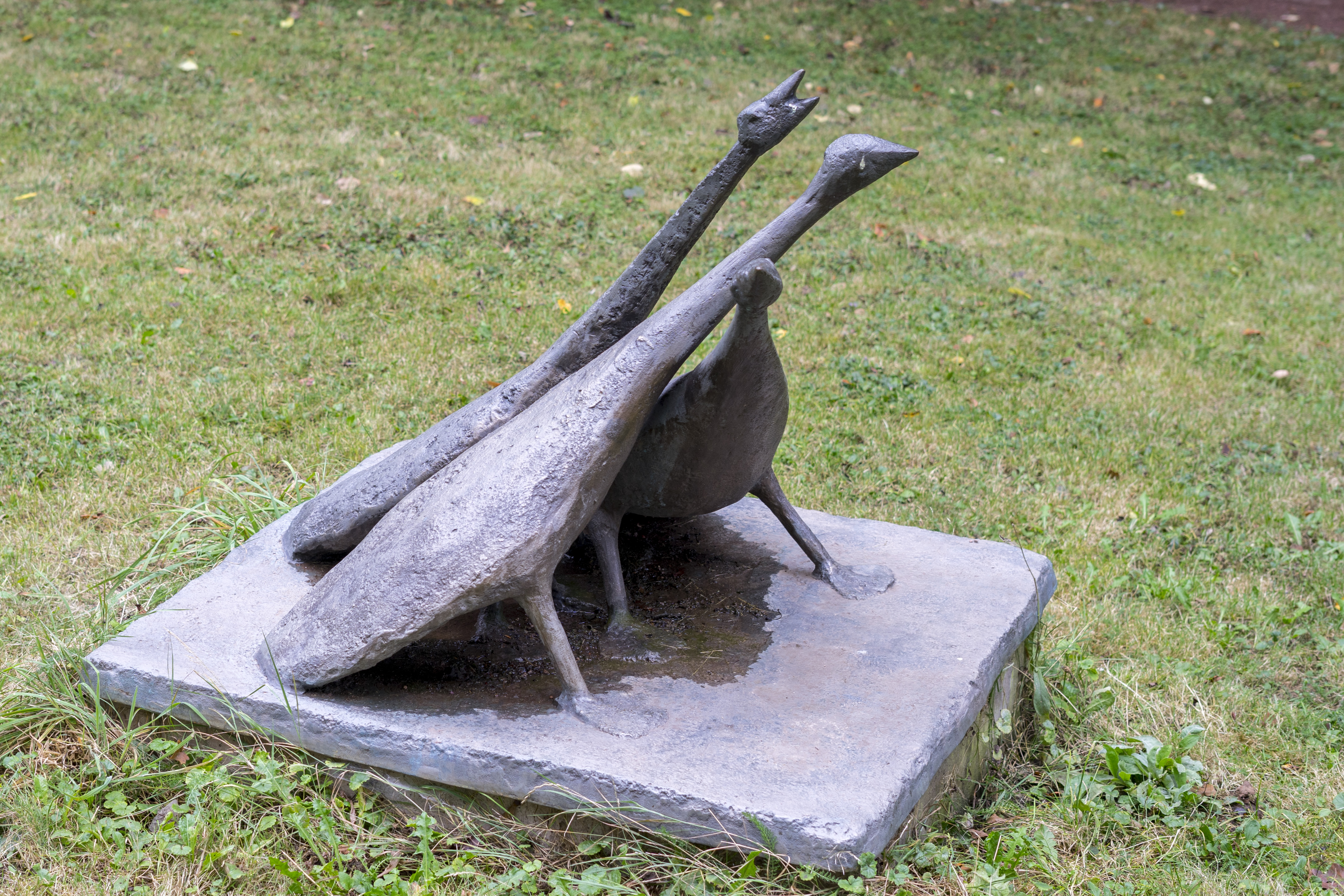 Drei Gänse, Rosenhöhe Darmstadt 1955 Dauerleihgabe von Gotthelf Schlotter